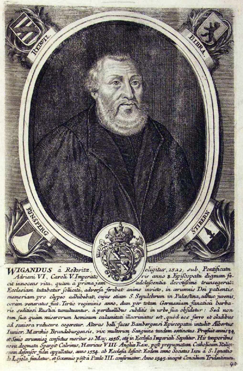 Weigand von Redwitz Fürstbischof in Bamberg